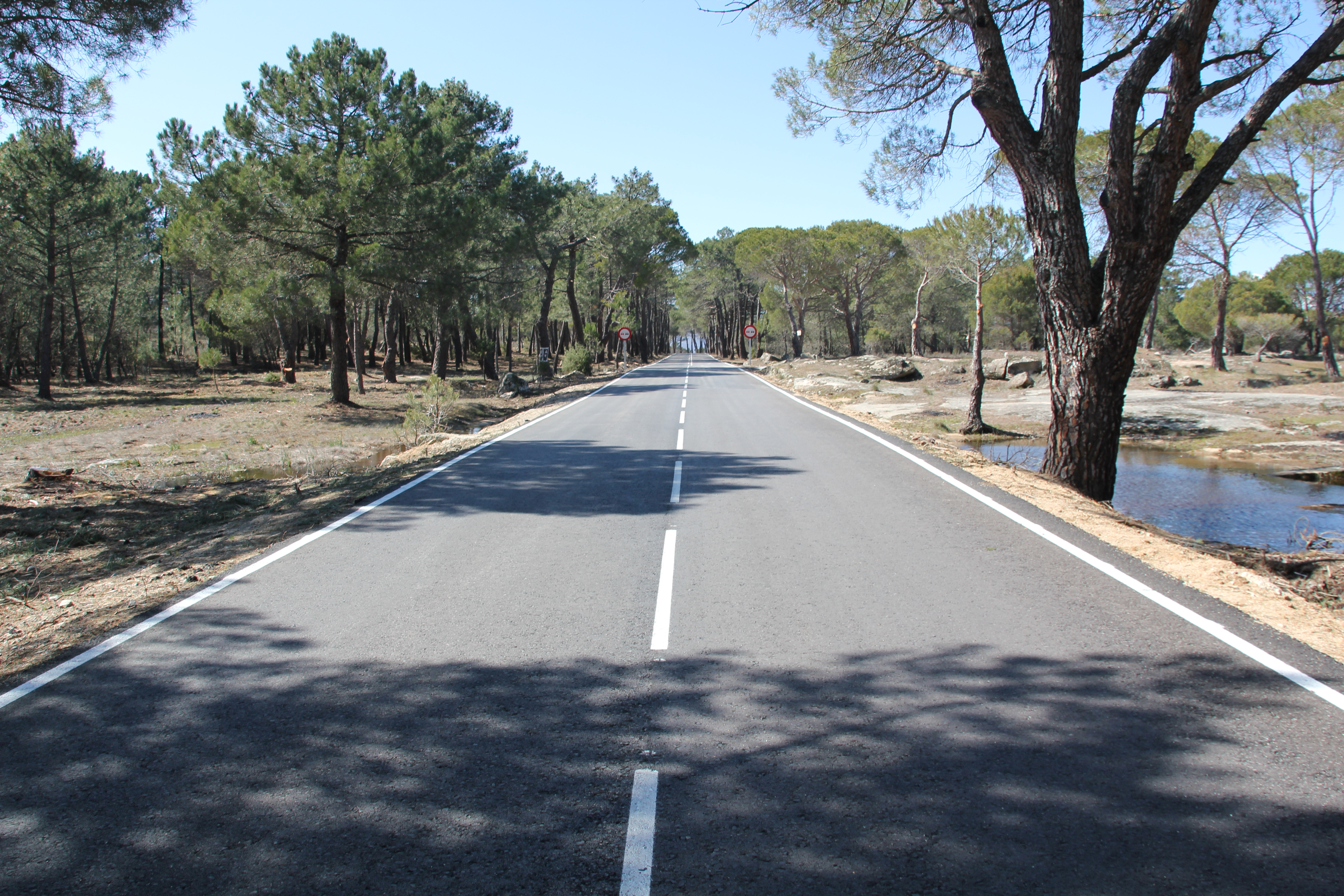 Nueva carretera entre El Venero y Cadalso de los Vidrios.